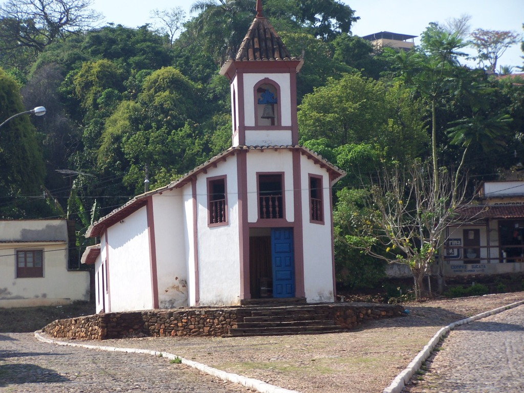 Capela de Nossa Senhora do Ó em Sabara - Minas Gerais, Brasil.